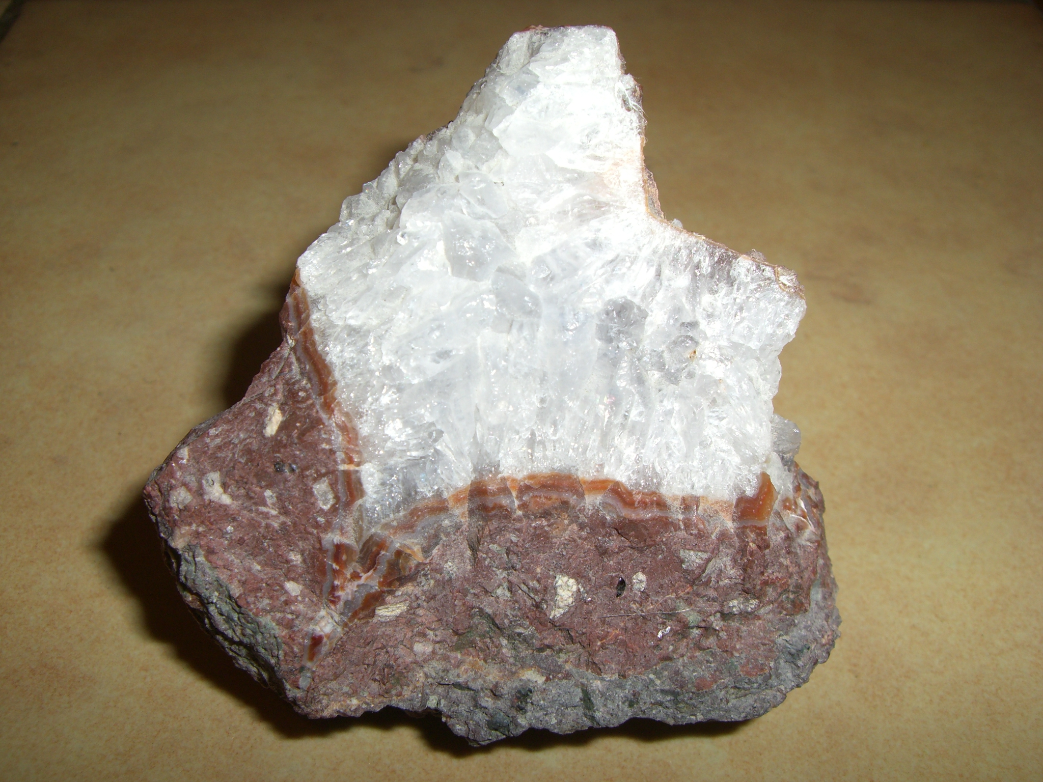 Schneekopfkugel